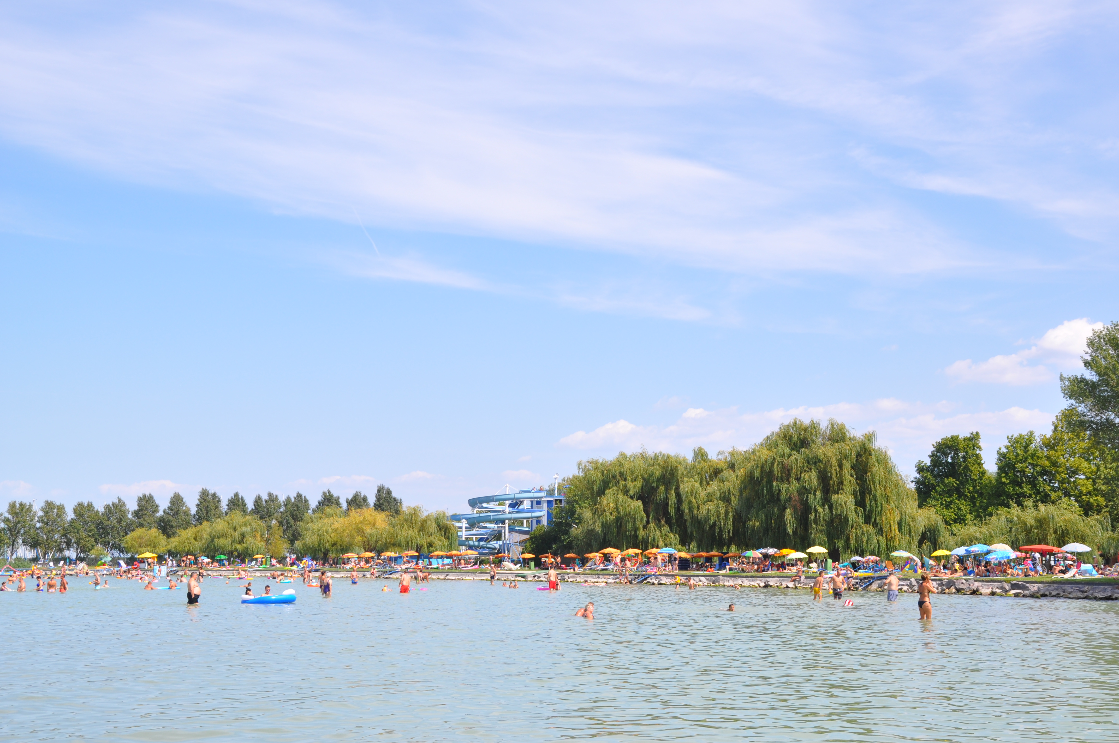 Balatonlelle, Balaton